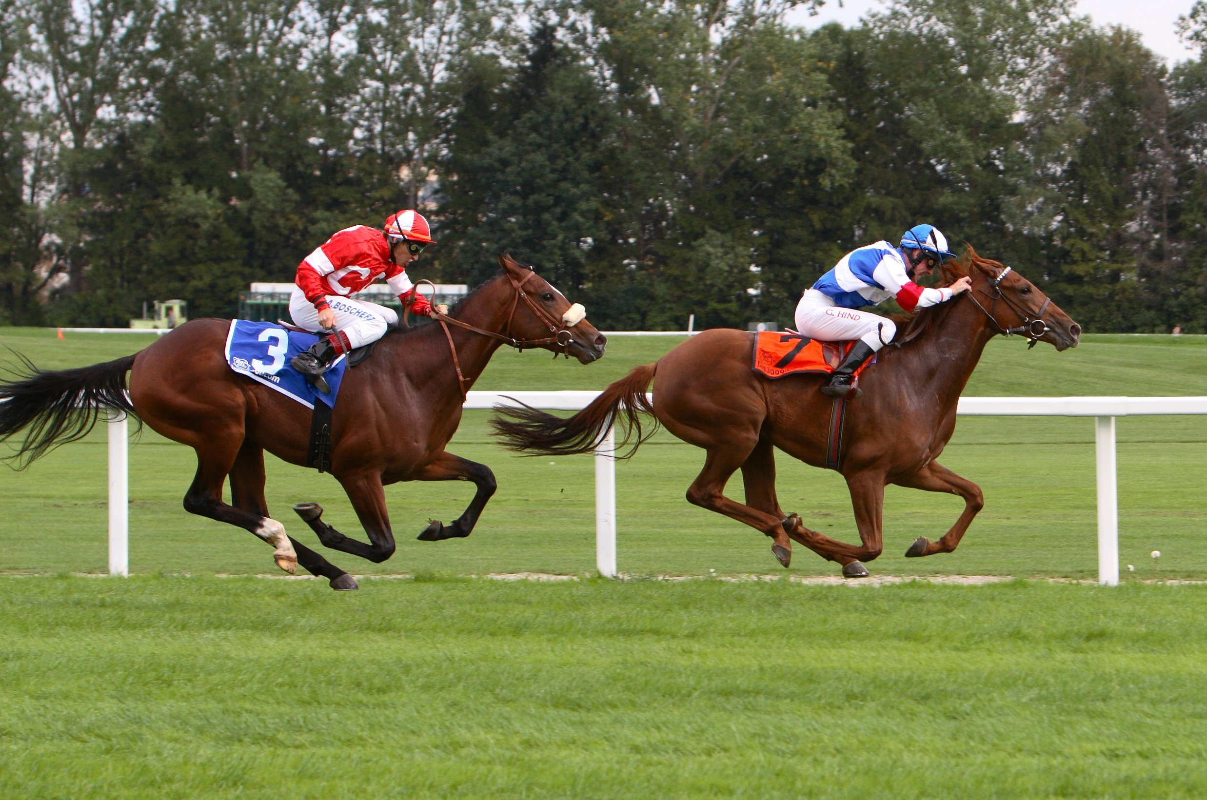 2 Rennpferde im Galopp